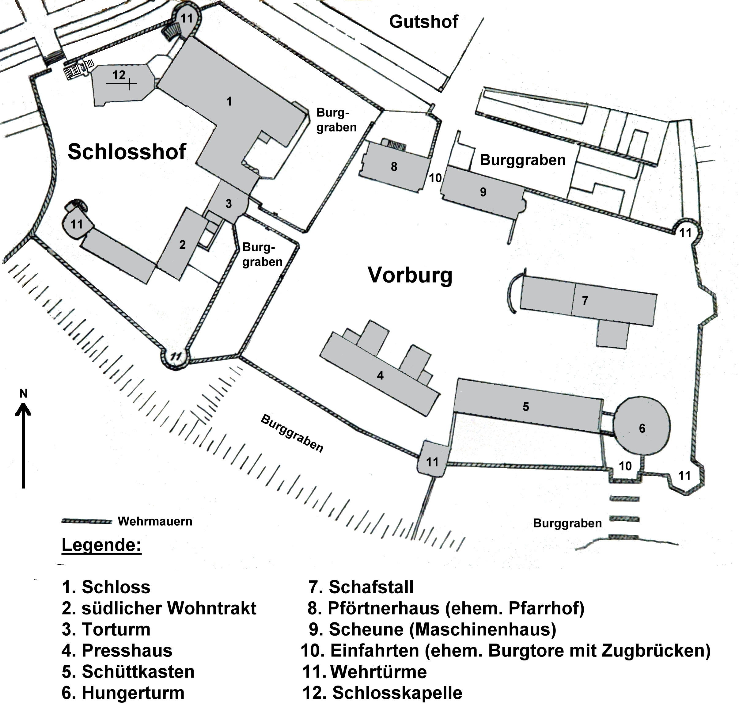 Schloss Schrattenthal / Lageplan